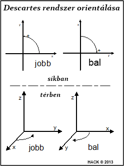 Jobb- és balsodrású Descartes-koordináták